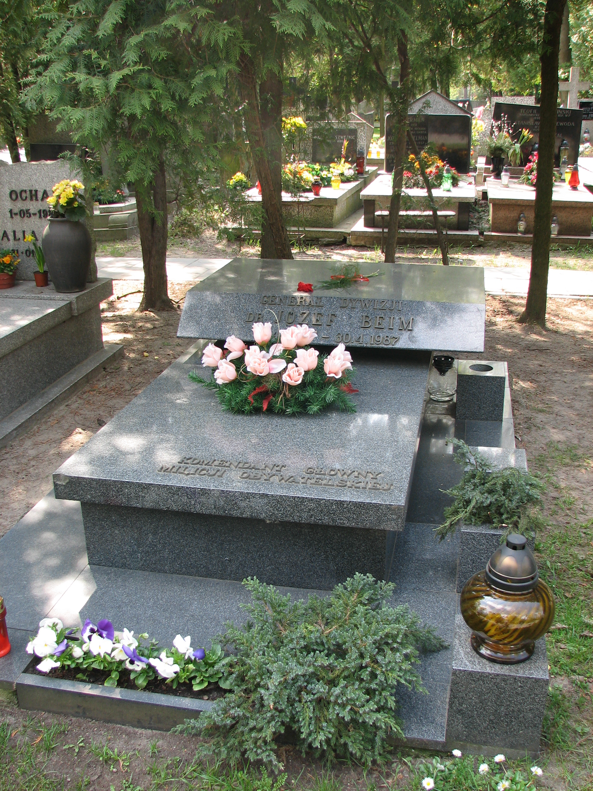 Józef Beim grób - Warszawa, Cmentarz Wojskowy na Powązkach